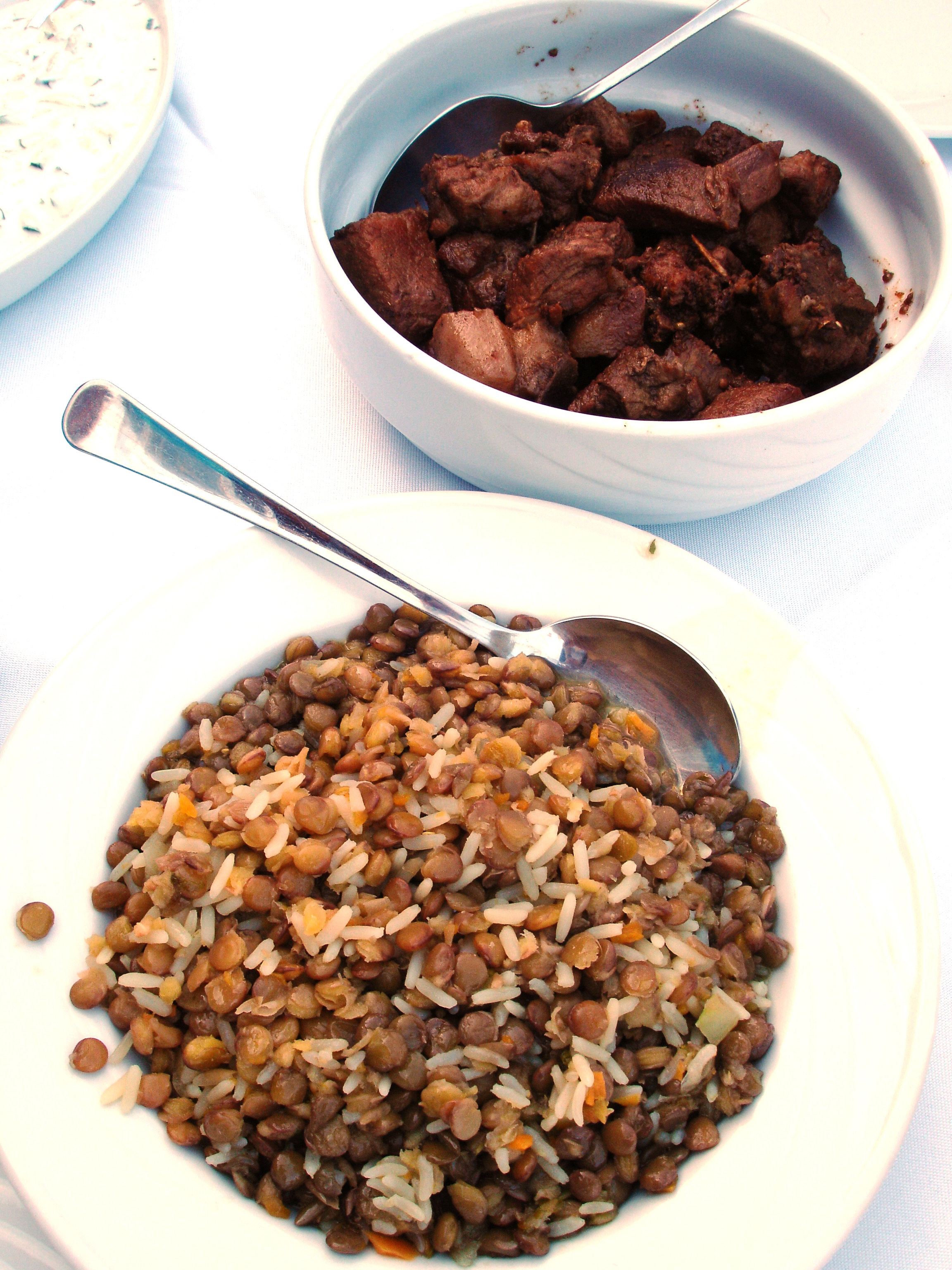 Afélia et son accompagnement de moutzéndra